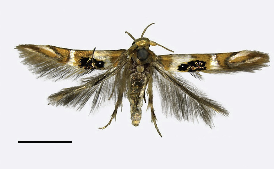 Hieromantis kurokoi